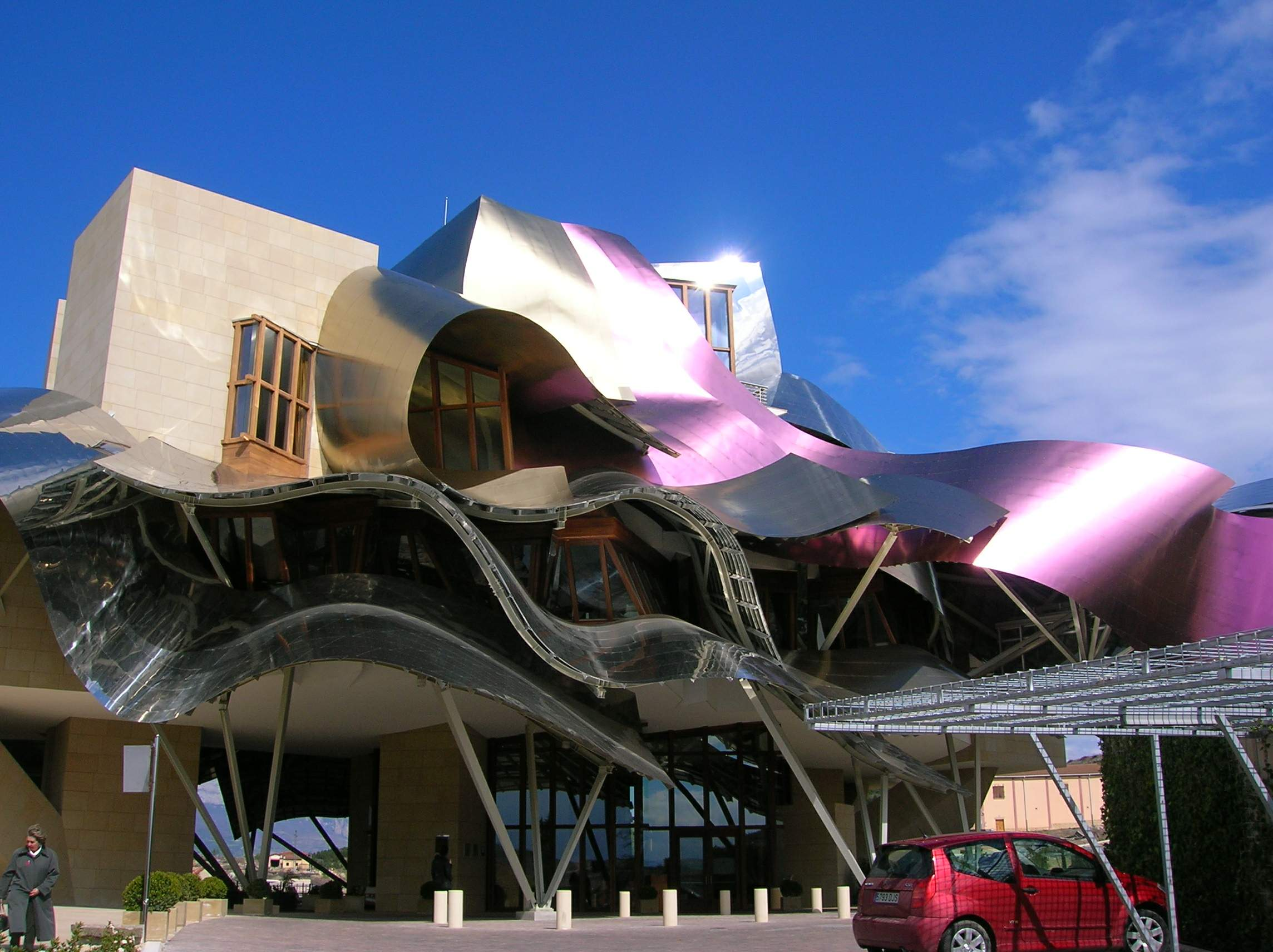 Ciudad del Vino-Marqués de Riscal (Elciego, Álava)